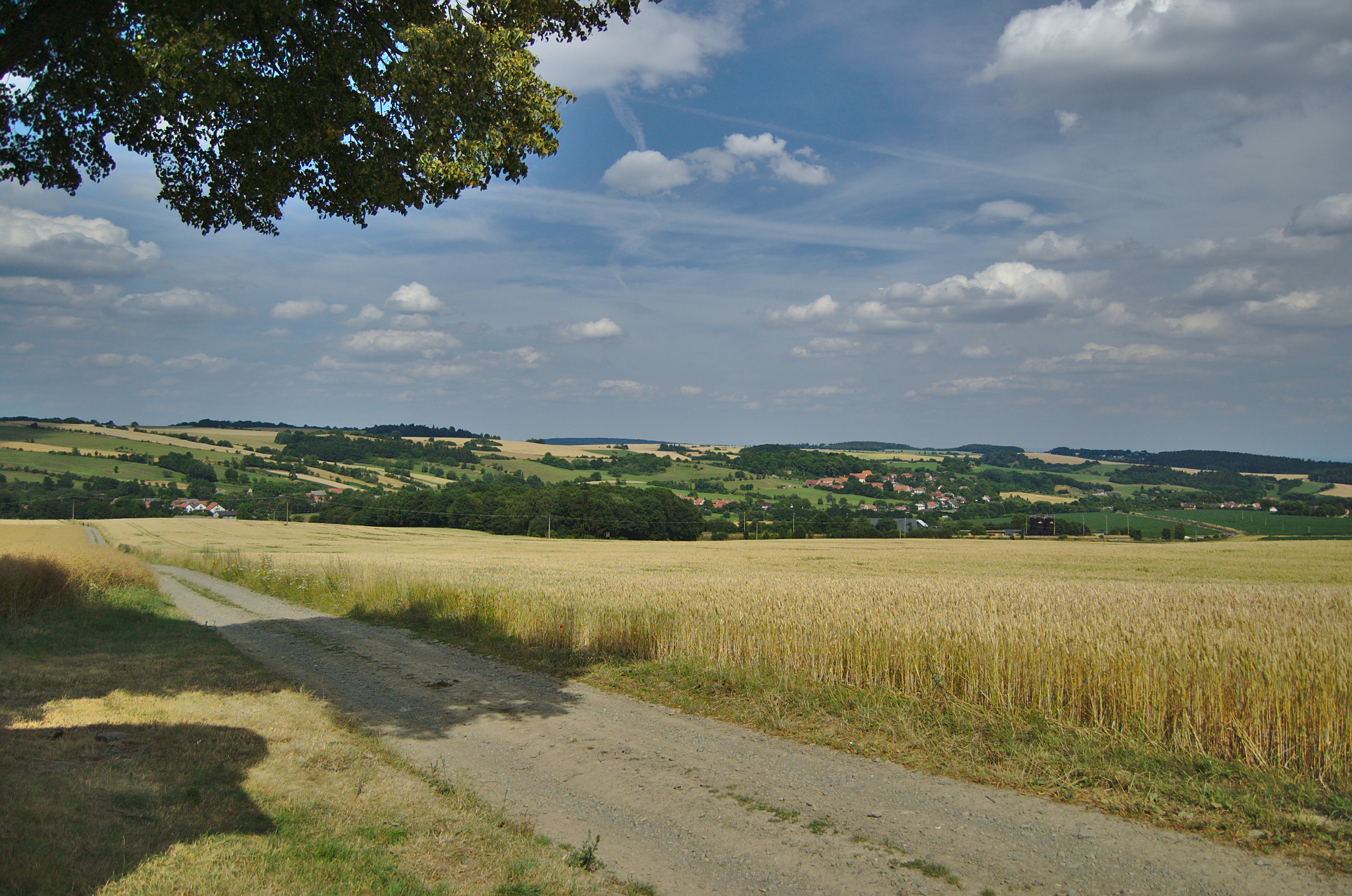 Výhled na Dzbel a Jesenec od kapličky svaté Anny, Dzbel, okres Prostějov